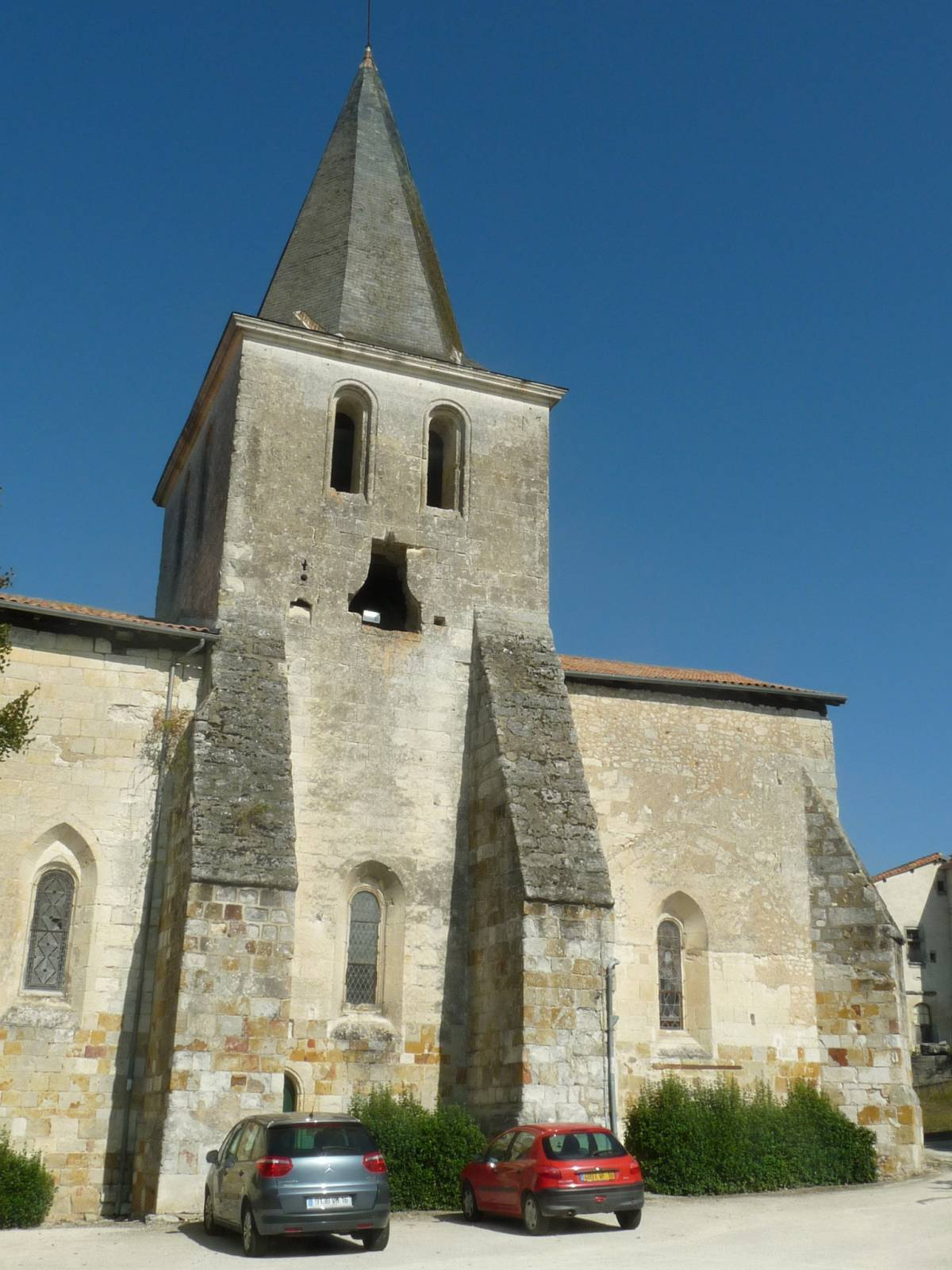 église d'Yviers (16), France. Noter le trou pour passer la cloche, qui se voit comme le nez au milieu d'un visage.